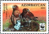 Circaetus gallicus.